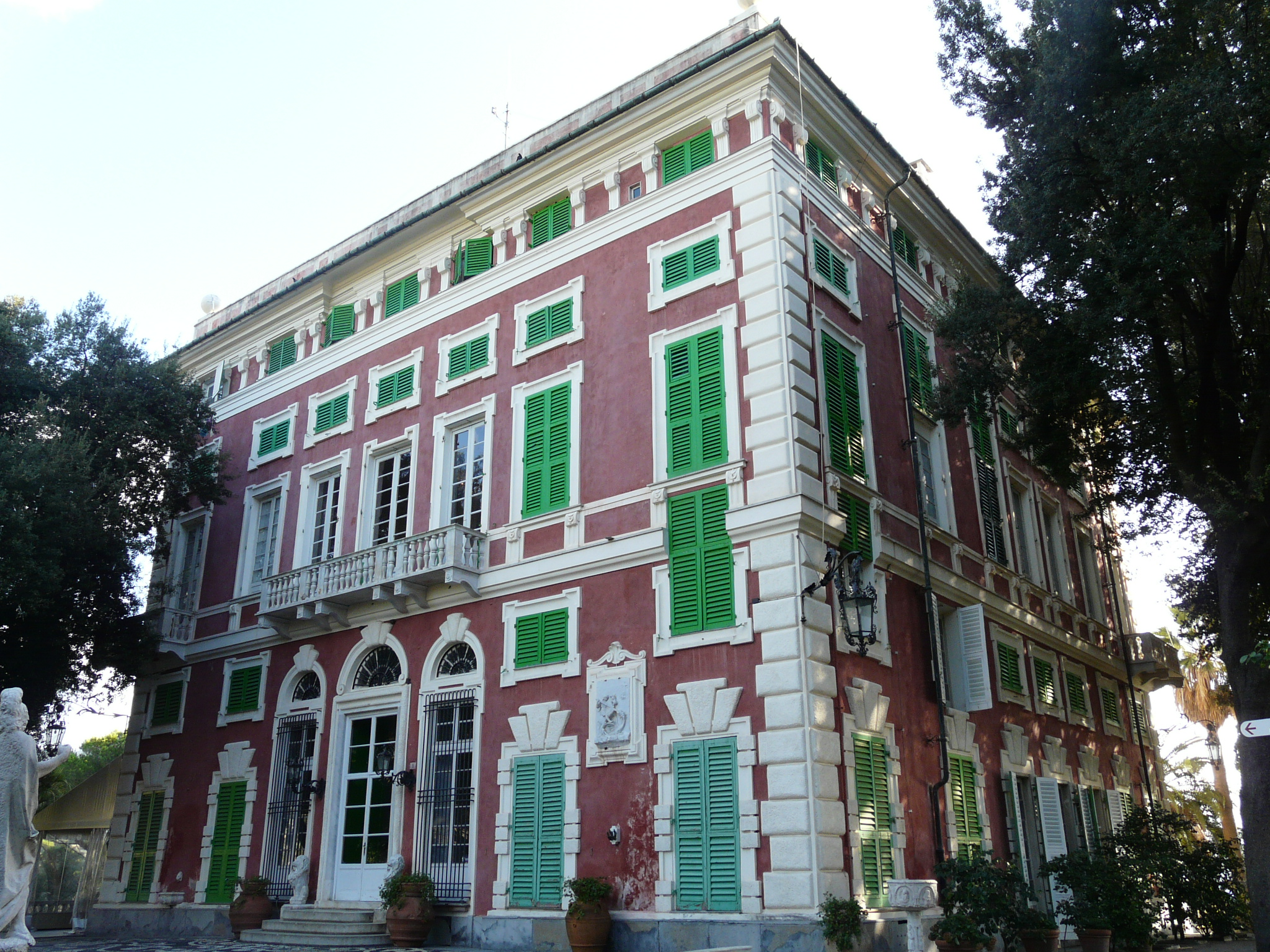 Villa Durazzo Centurione, Santa Margherita Ligure, Liguria, Italia